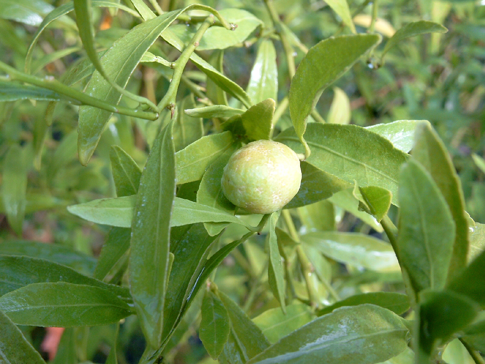 Eremolemon Frucht und Zweige